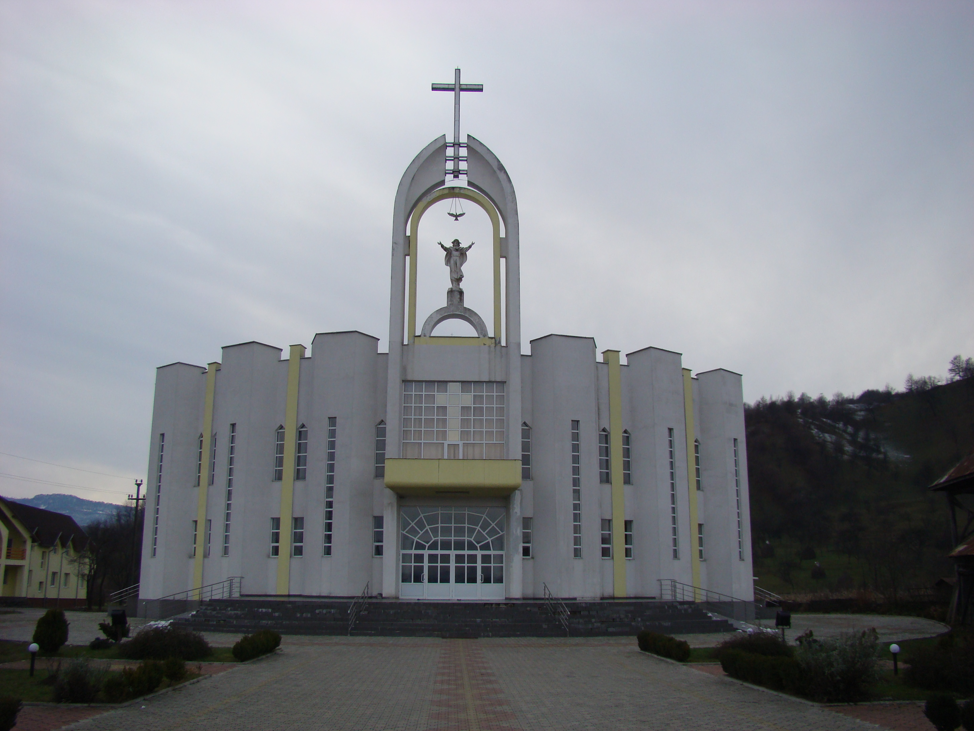 Biserica greco-catolică din Sarasău, județul Maramureș